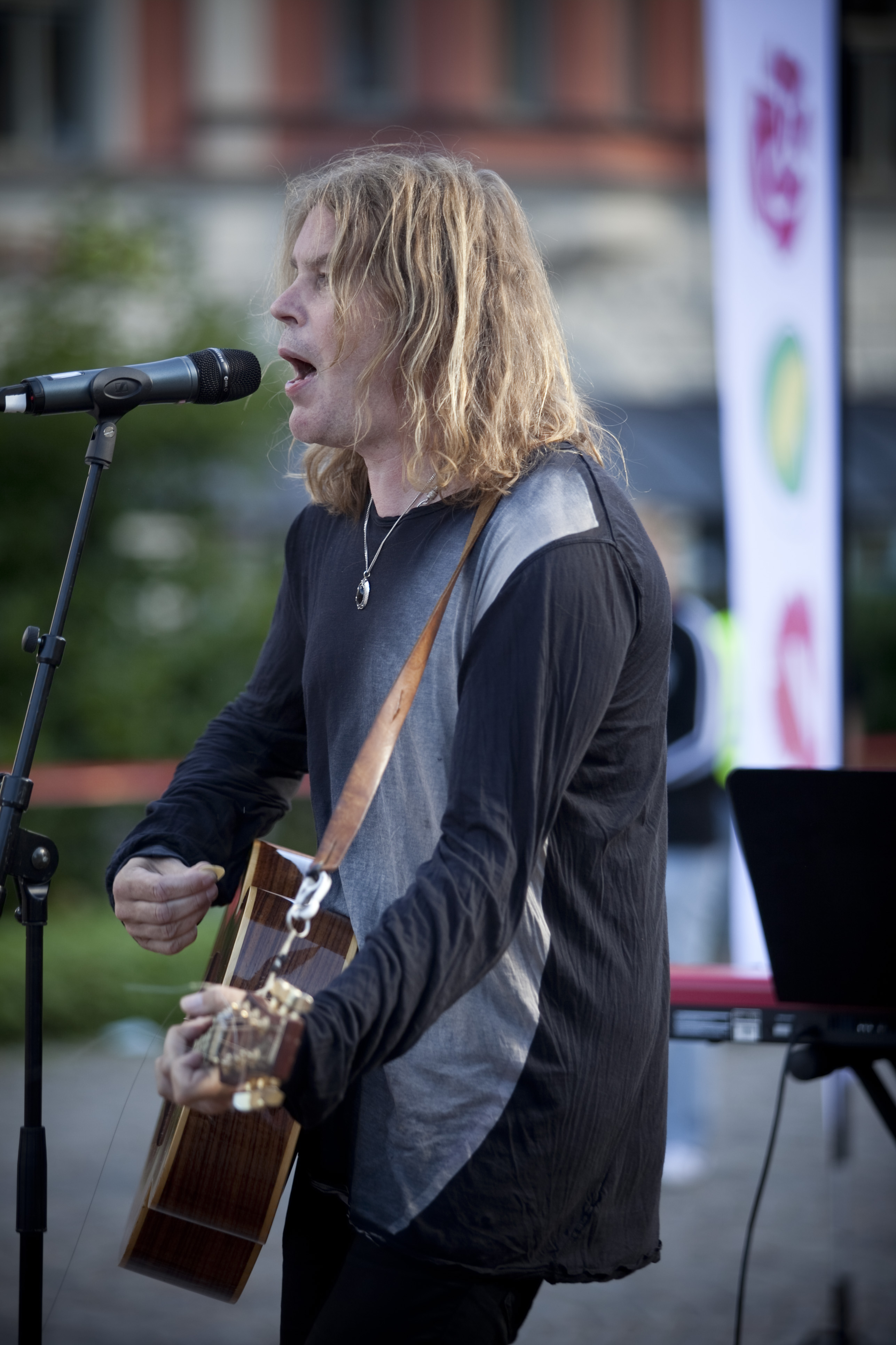 Staffan Hellstrand uppträdde i Eskilstuna på den Rödgröna dagen 100823